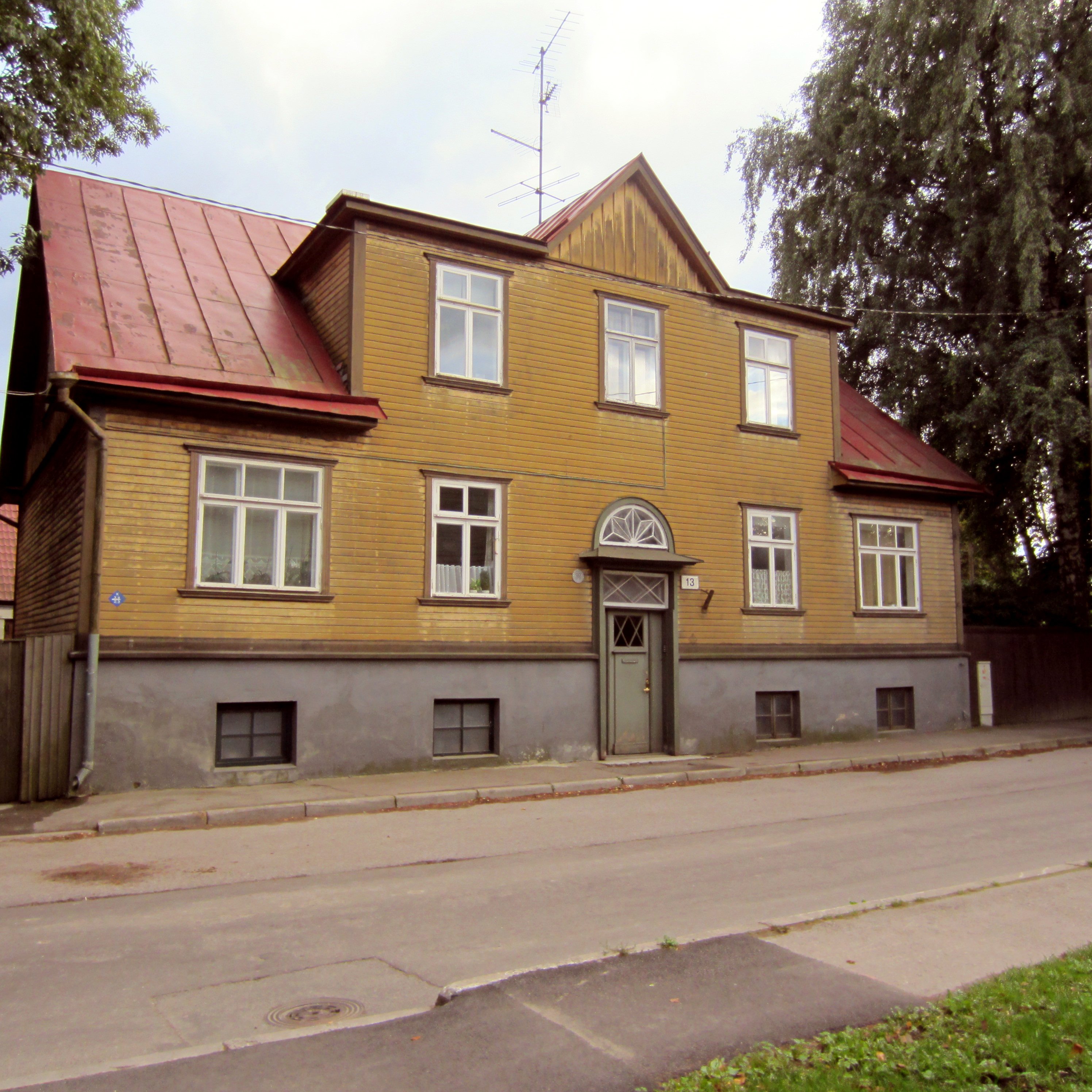 Elamu Saturni tn 13, 1930. aastad